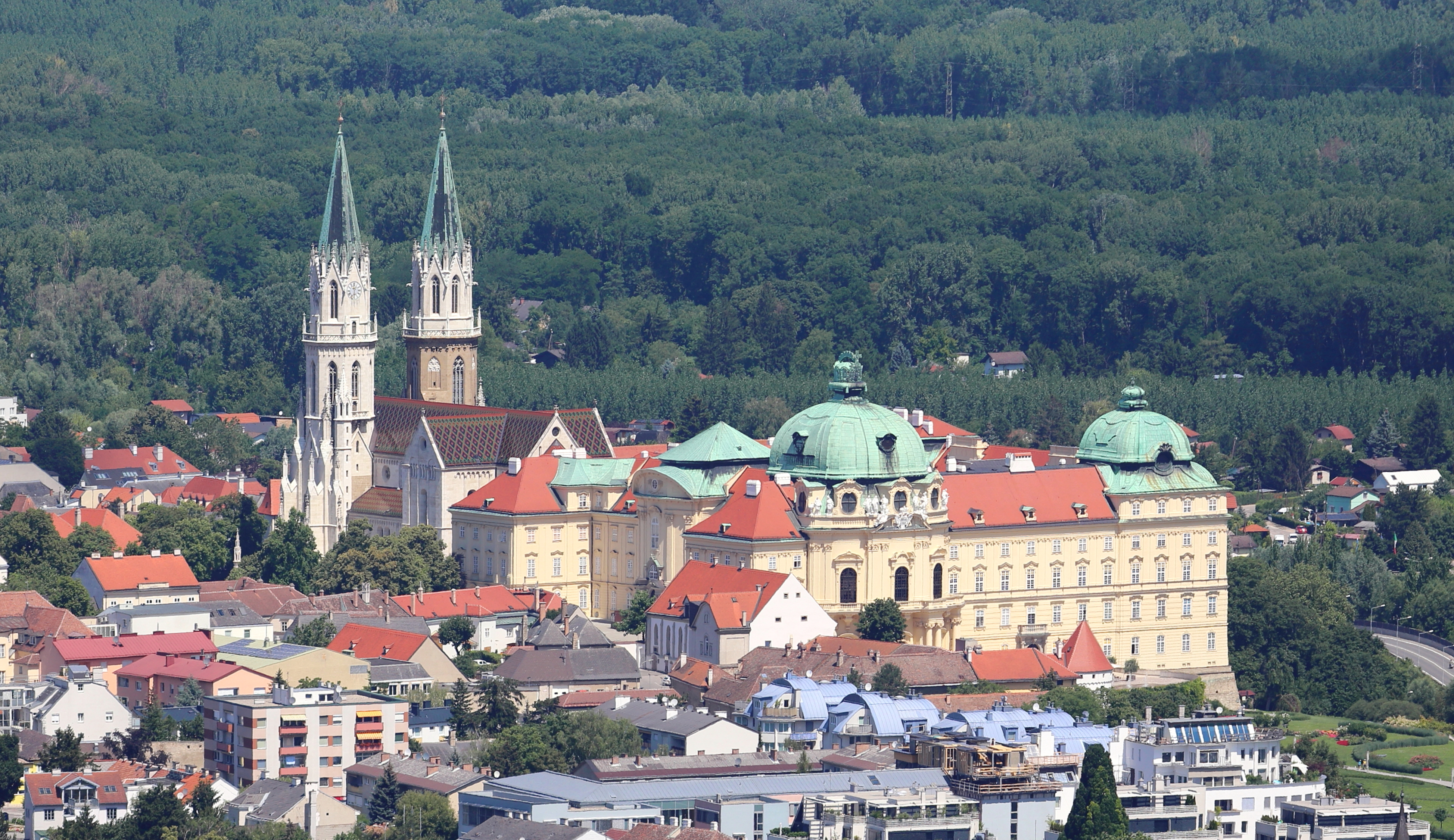 Südsüdostansicht des Augustiner-Chorherrenstiftes in der niederösterreichischen Stadt Klosterneuburg.Im Vordergrund der barocke Kaisertrakt, der ab 1730 errichtet wurde und im Hintergrund die Stiftskirche, deren Grundsteinlegung 1114 durch Markgraf Leopold III. erfolgte.